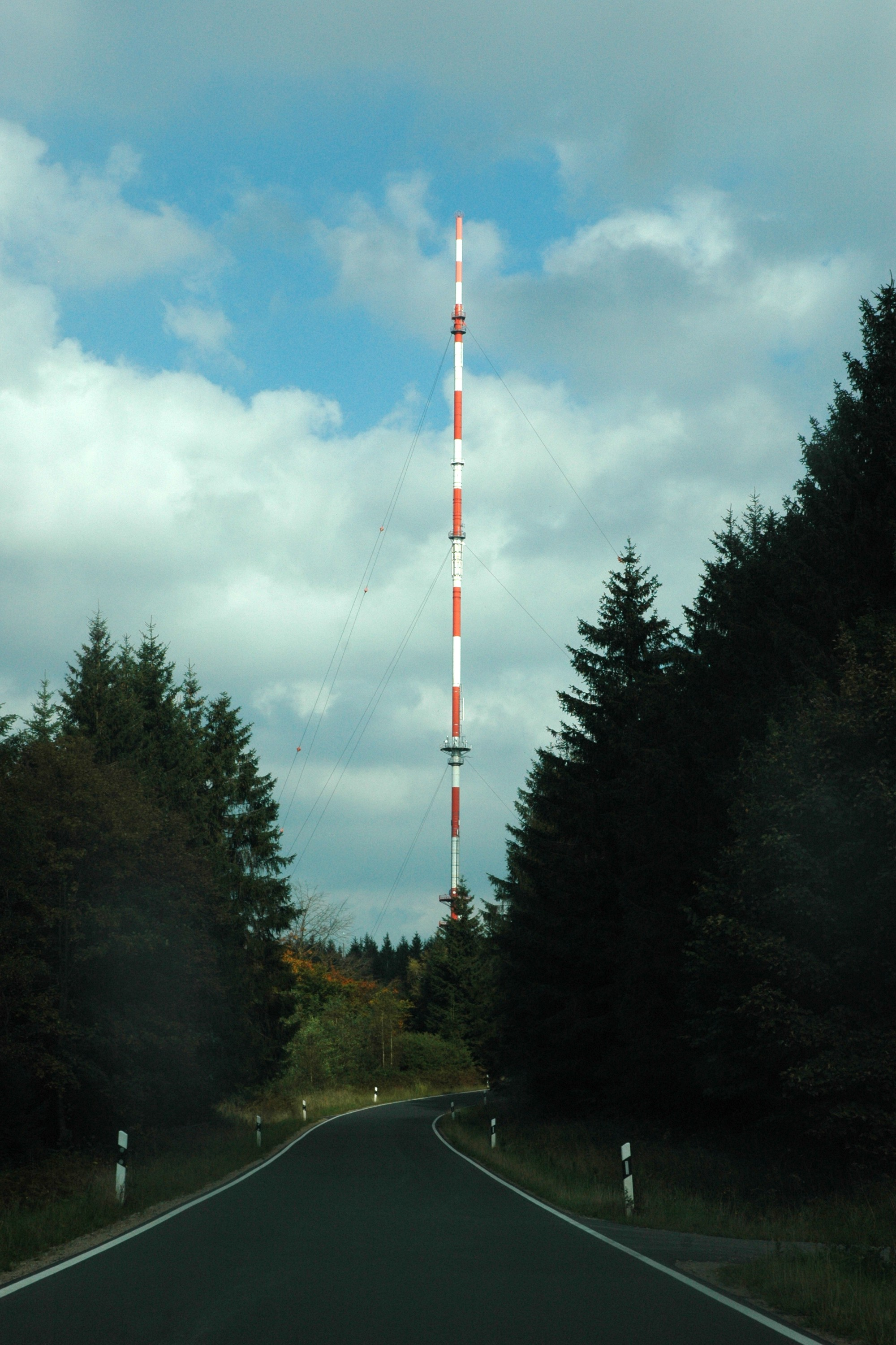 Sender Schnee-Eifel / Transmitter Schnee-Eifel (Germany)